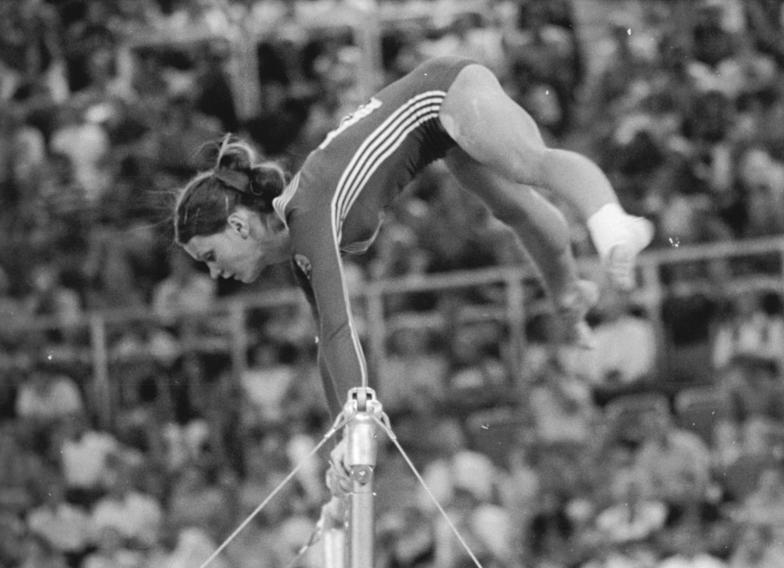 ADN-ZB-Olympiadienst-Kohls-28.8.1972-ma-München: XX. Olympische Sommerspiele - Turnen: In der Einzelwertung liegt nach der Pflicht am 27.8.72 die DDR-Meiserin Karin Janz mit 38,15 Punkten auf Platz zwei. Für ihre Übung am Stufenbarren (Foto) erhielt sie mit 9,85 Punkten die höchste Wertung des ersten Wettkampftages der Turnerinnen.